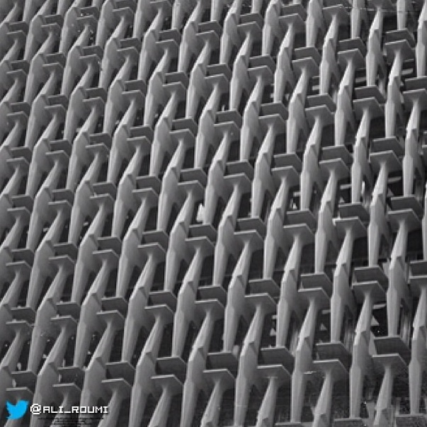 الكويت